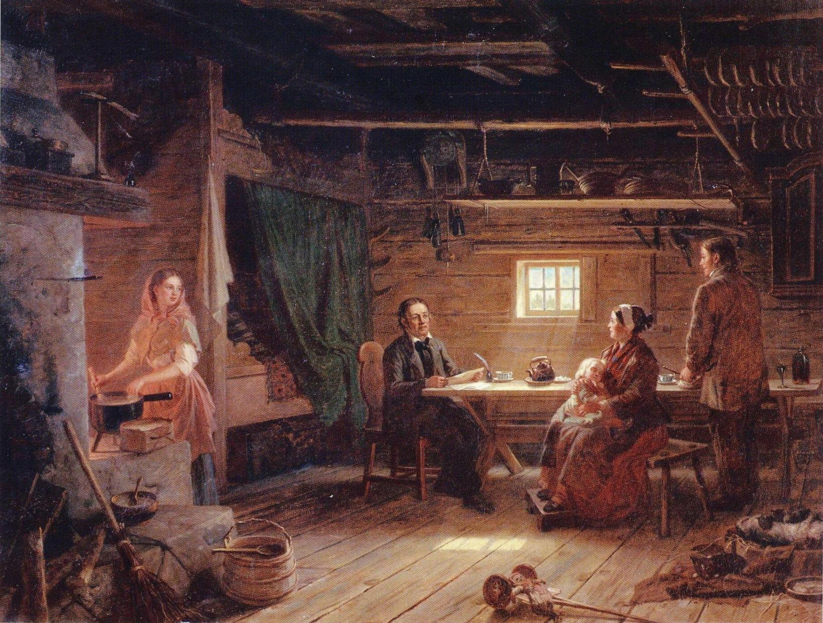 R. W. Ekmanin maalaus kansanrunoilija Pentti Lyytisestä (1783–1871).